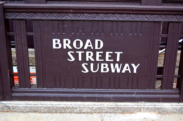 plaque du BSS